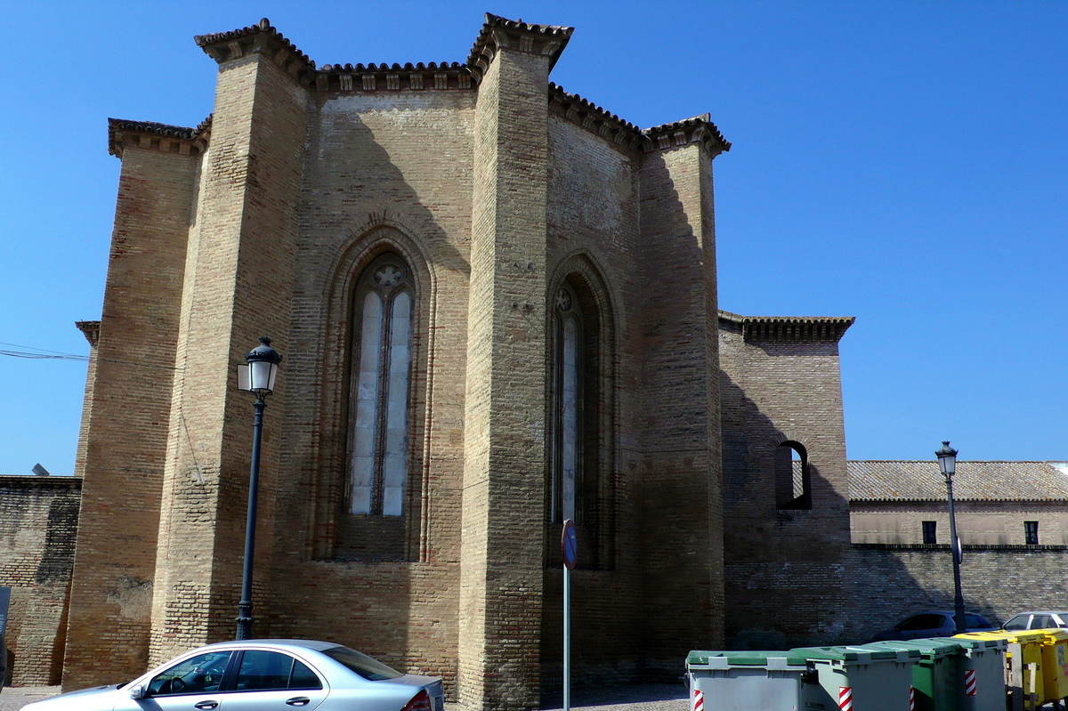 Vista exterior del Monasterio de Santa Clara (Moguer) por la Plaza de las Monjas